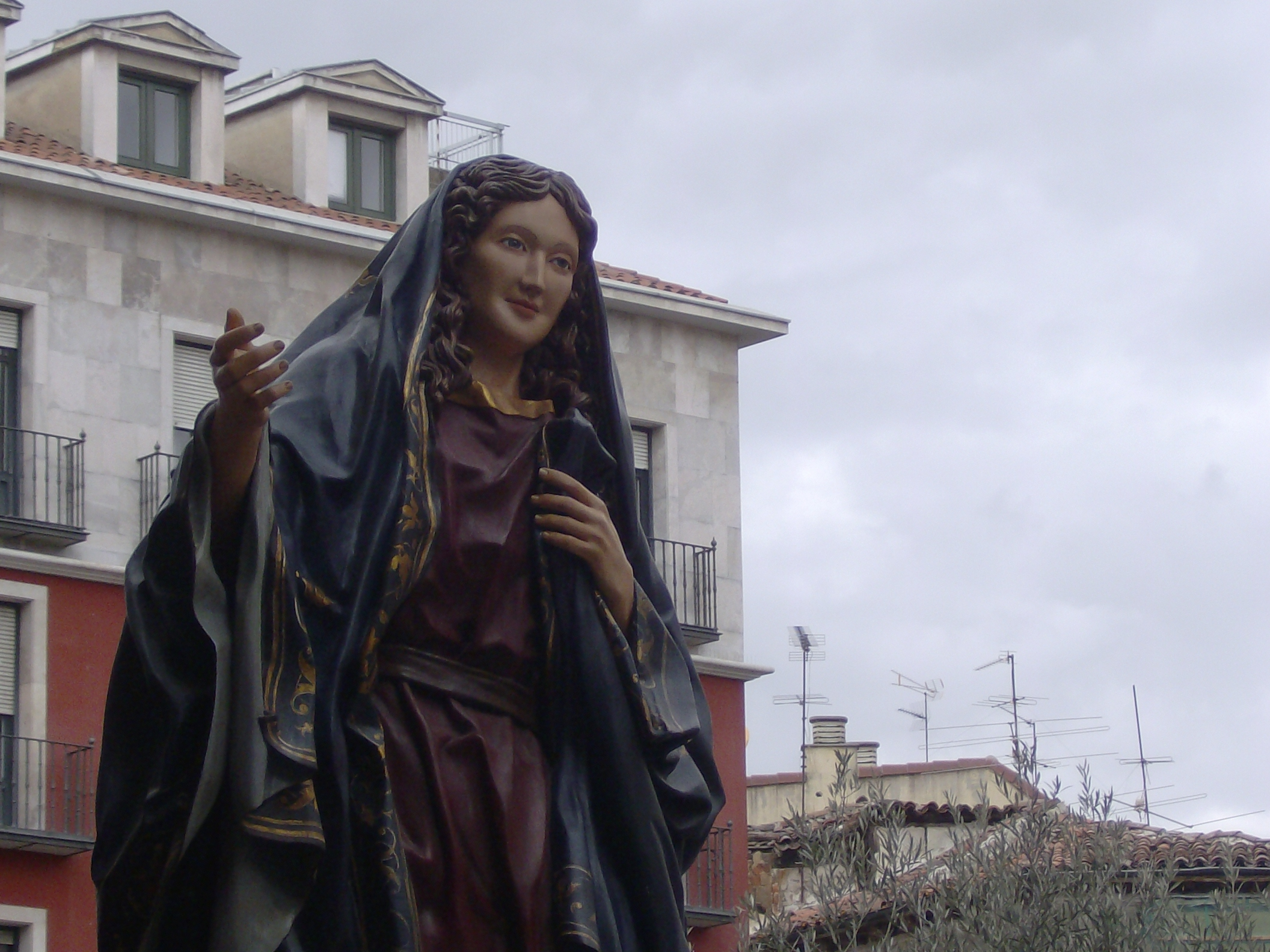 Virgen de la Alegria (Miguel Angel Tapia), Valladolid